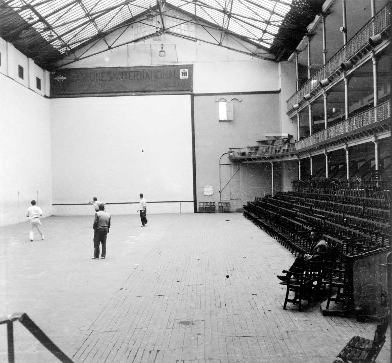 Astelena pilotalekua, 1960an. Garcia Ariño I.a da jokatzen ari ziren pilotarietako bat.